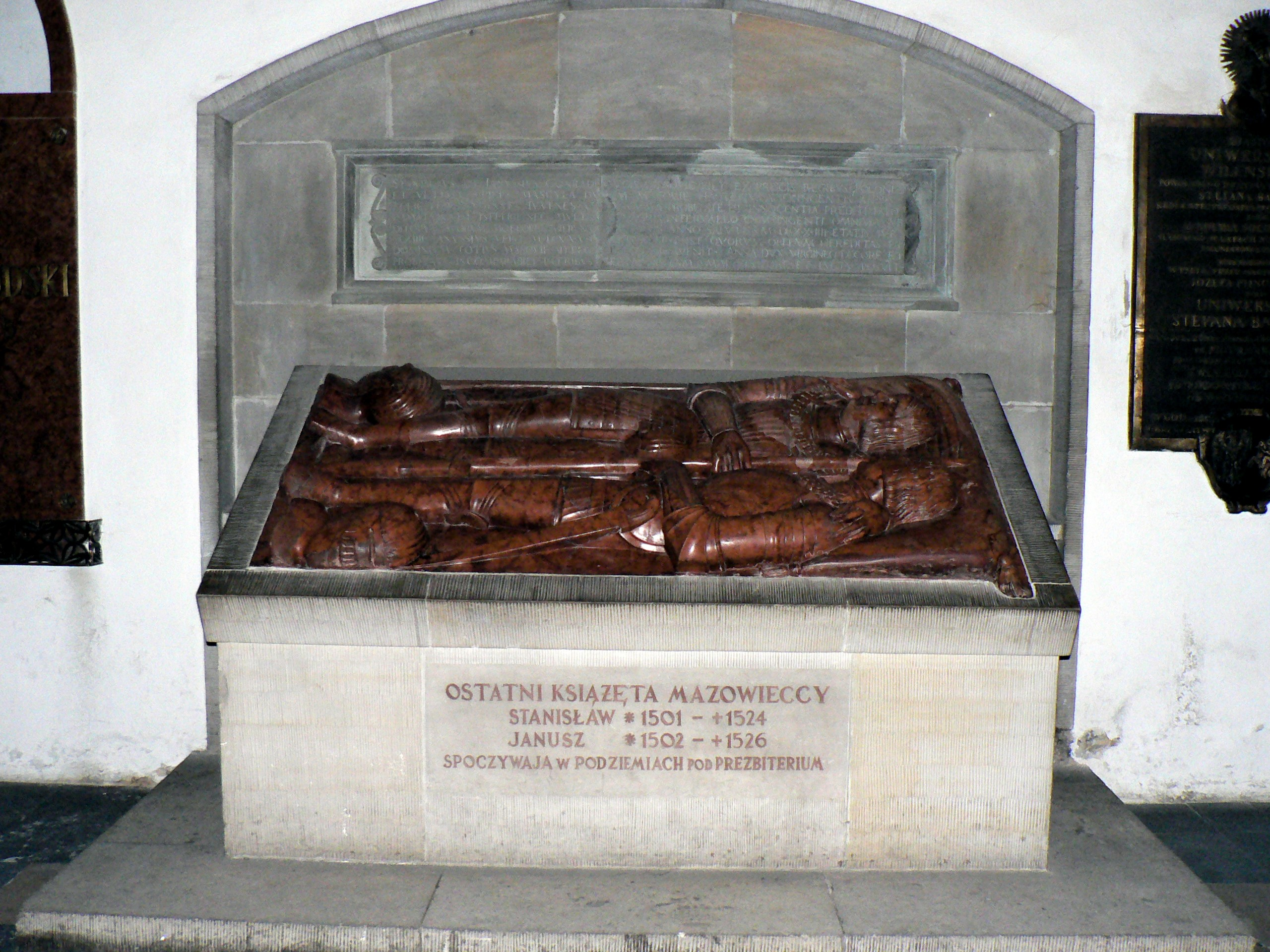 Krypta ostatnich książąt mazowieckich w katedrze św. Jana w Warszawie